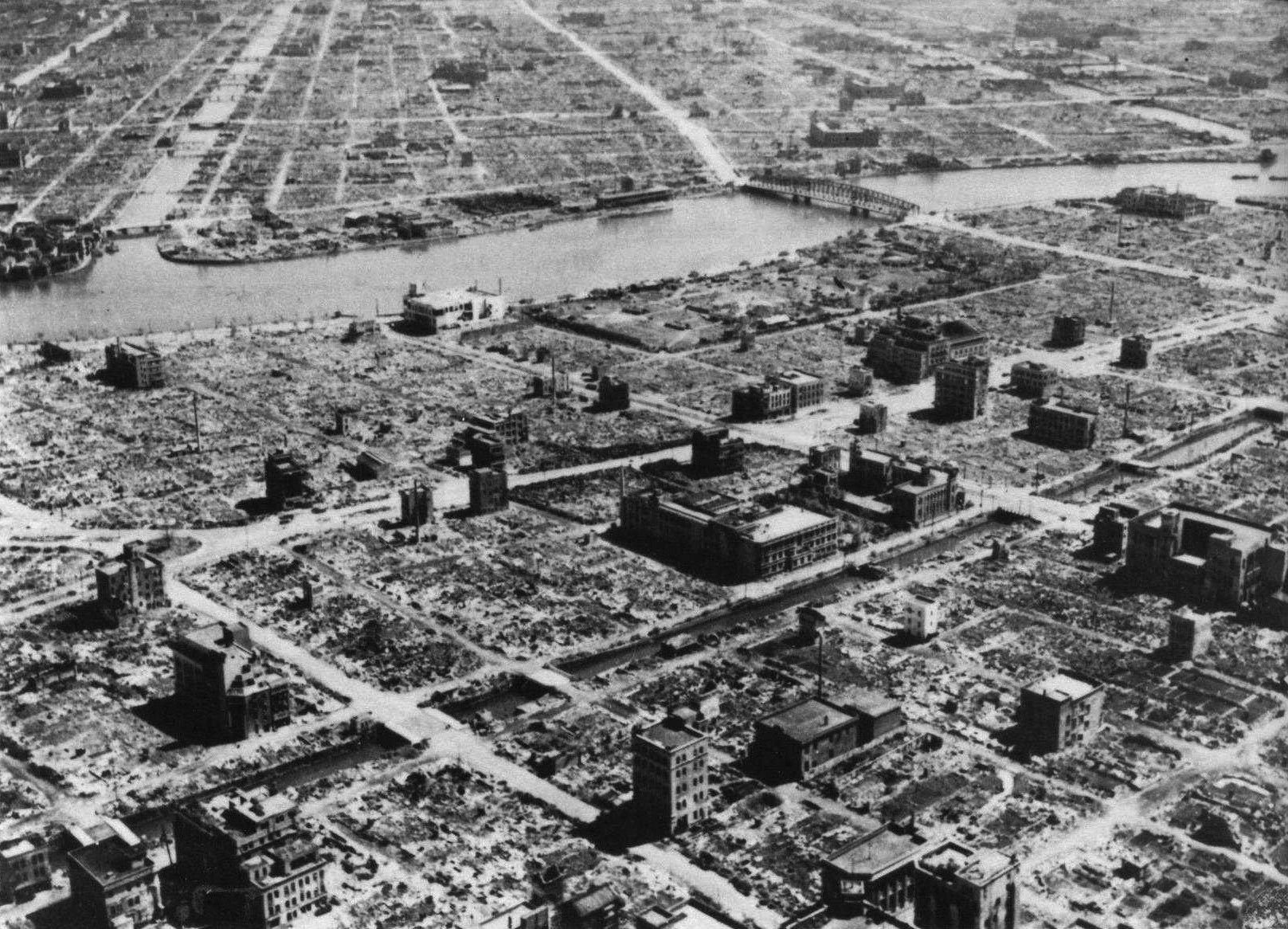 空襲により焦土と化した東京。日本橋浜町、久松町付近。隅田川にかかる橋は新大橋。